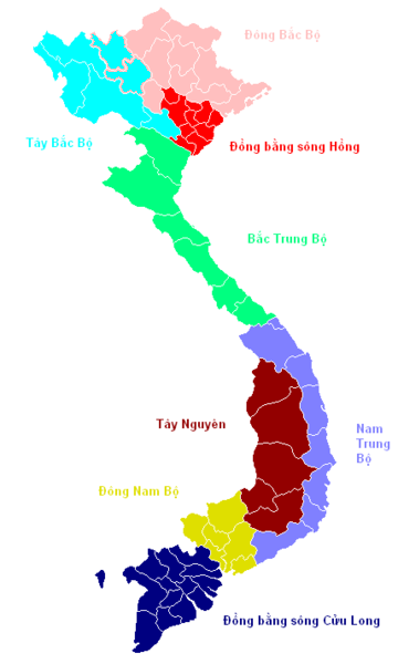 tập tin VietnameseRegions.png nhưng đã được dịch ra tiếng Việt